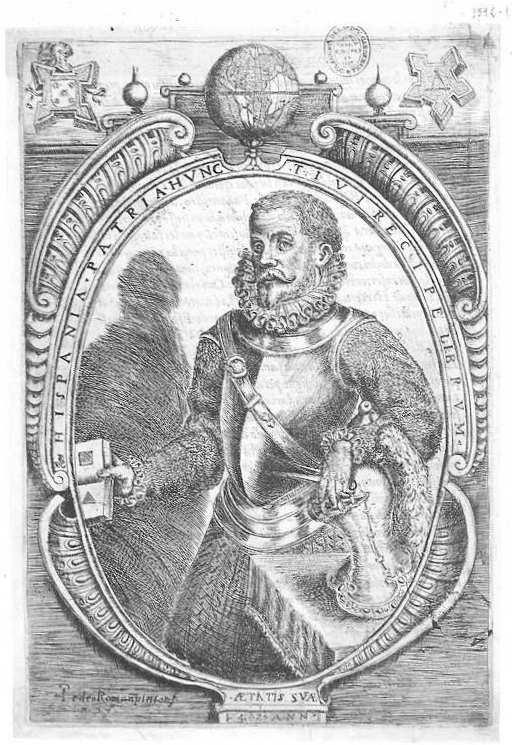 Pedro Román: retrato de Cristóbal de Rojas publicado al frente de su "Teoría y práctica de fortificación, conforme las medidas y defensas destos tiempos". Madrid, 1598.